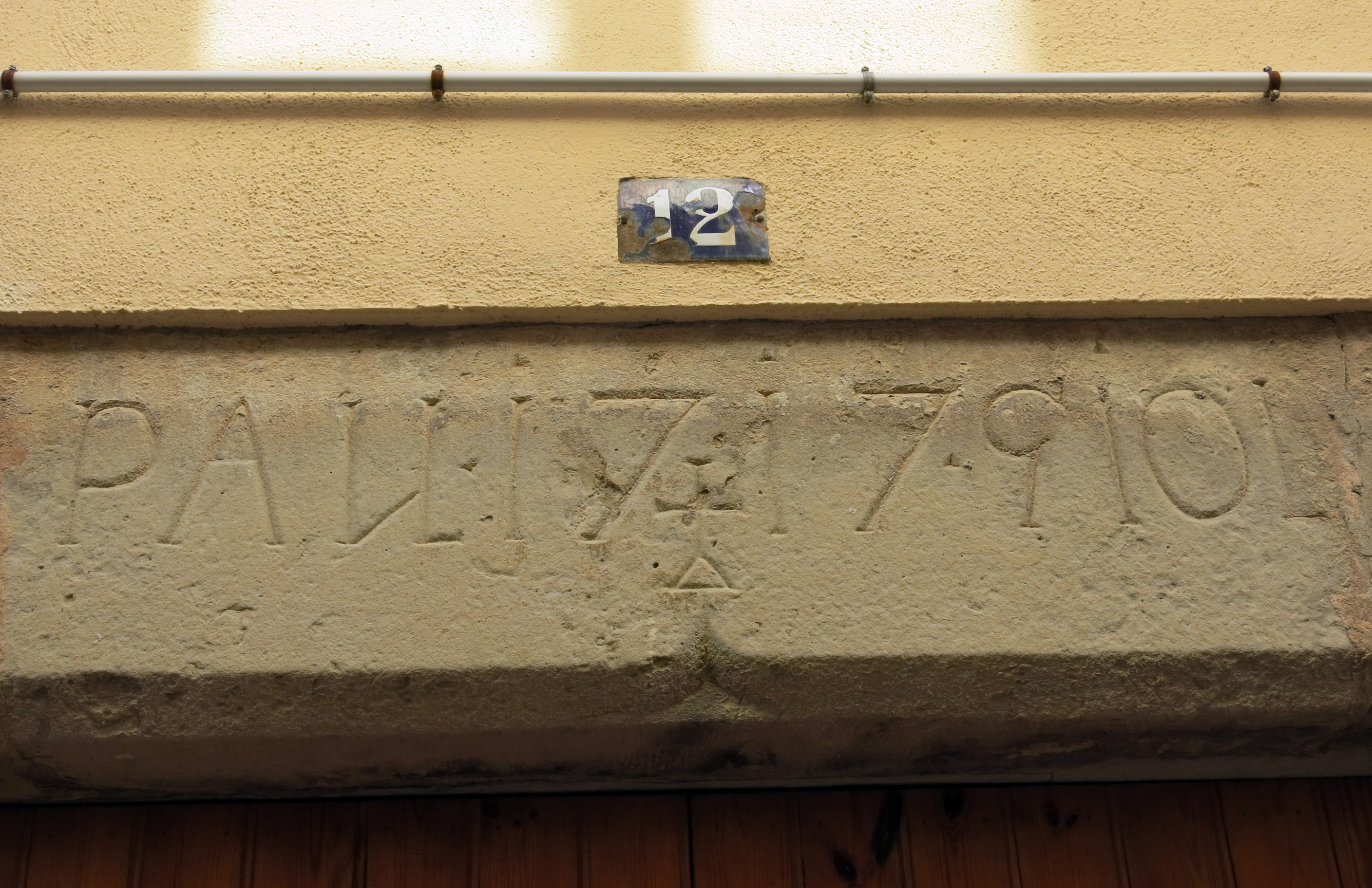 Casa Pau Giol (Centelles)